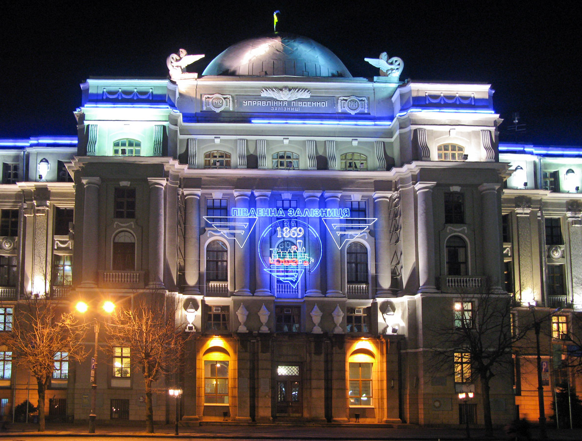 Харків. Управління Південної залізниці